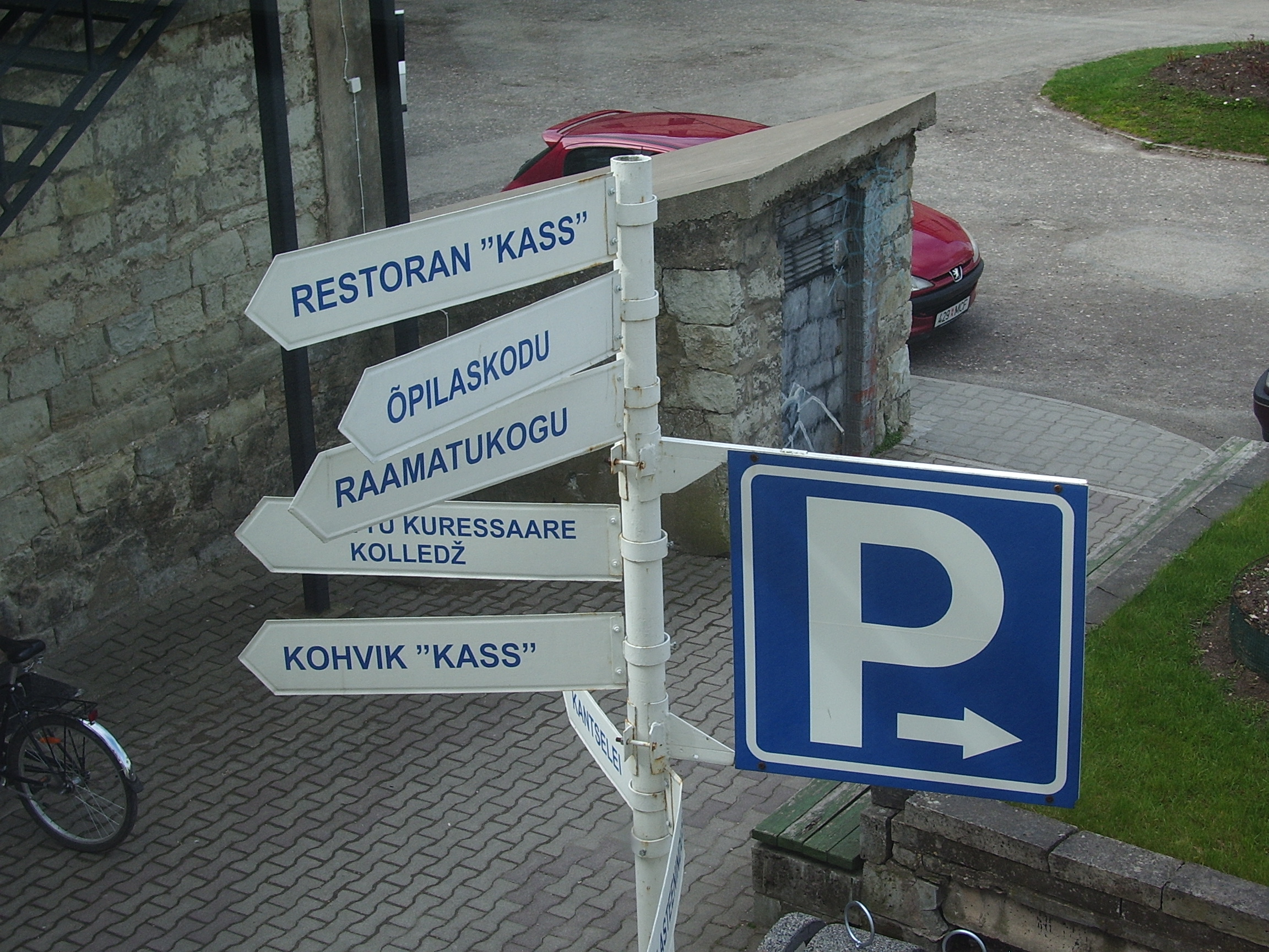 Viidapost Kuressaare Ametikooli hoovil